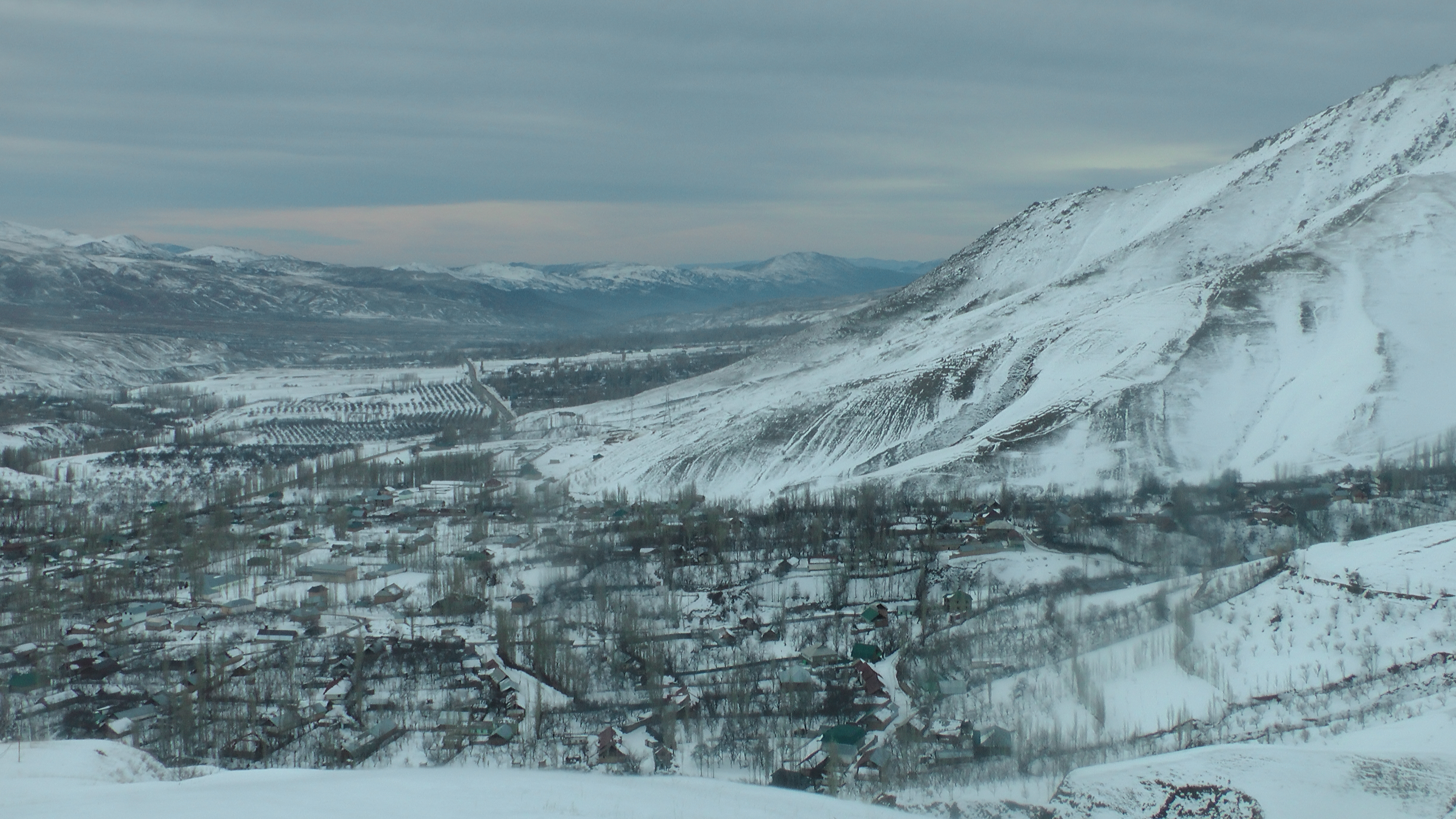 Тоҷикӣ: Бобои Валӣ (Дараи гусфандак)